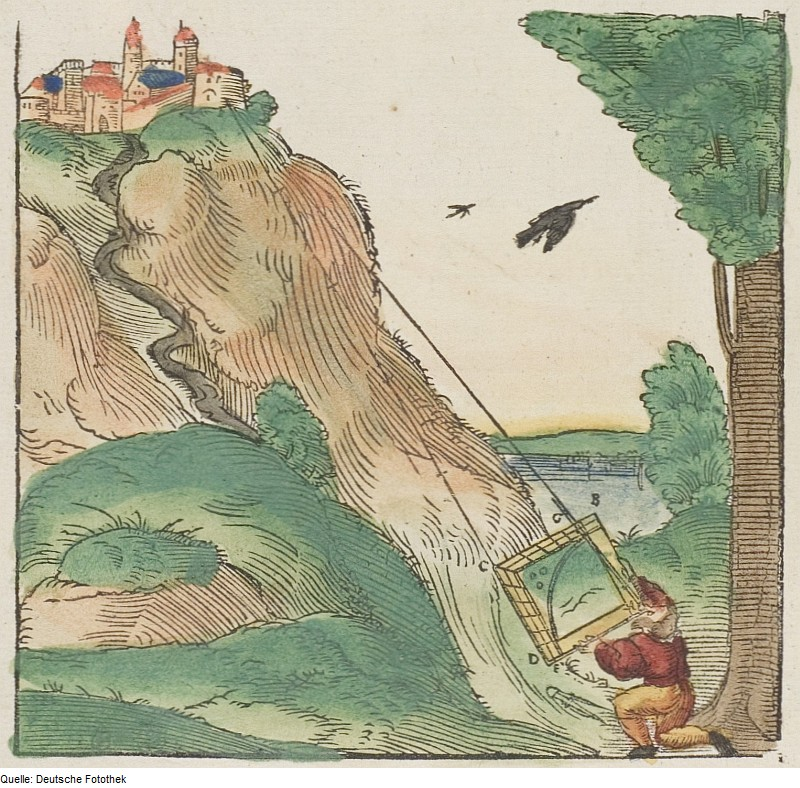 Original image description from the Deutsche Fotothek Geometrie & Vermessung & Quadrant & Gebäude